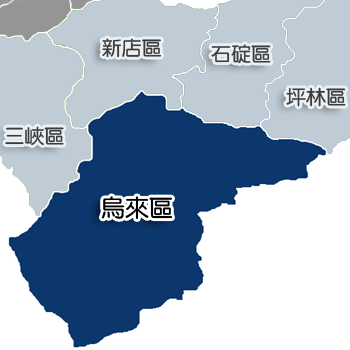 烏來區相對位置。